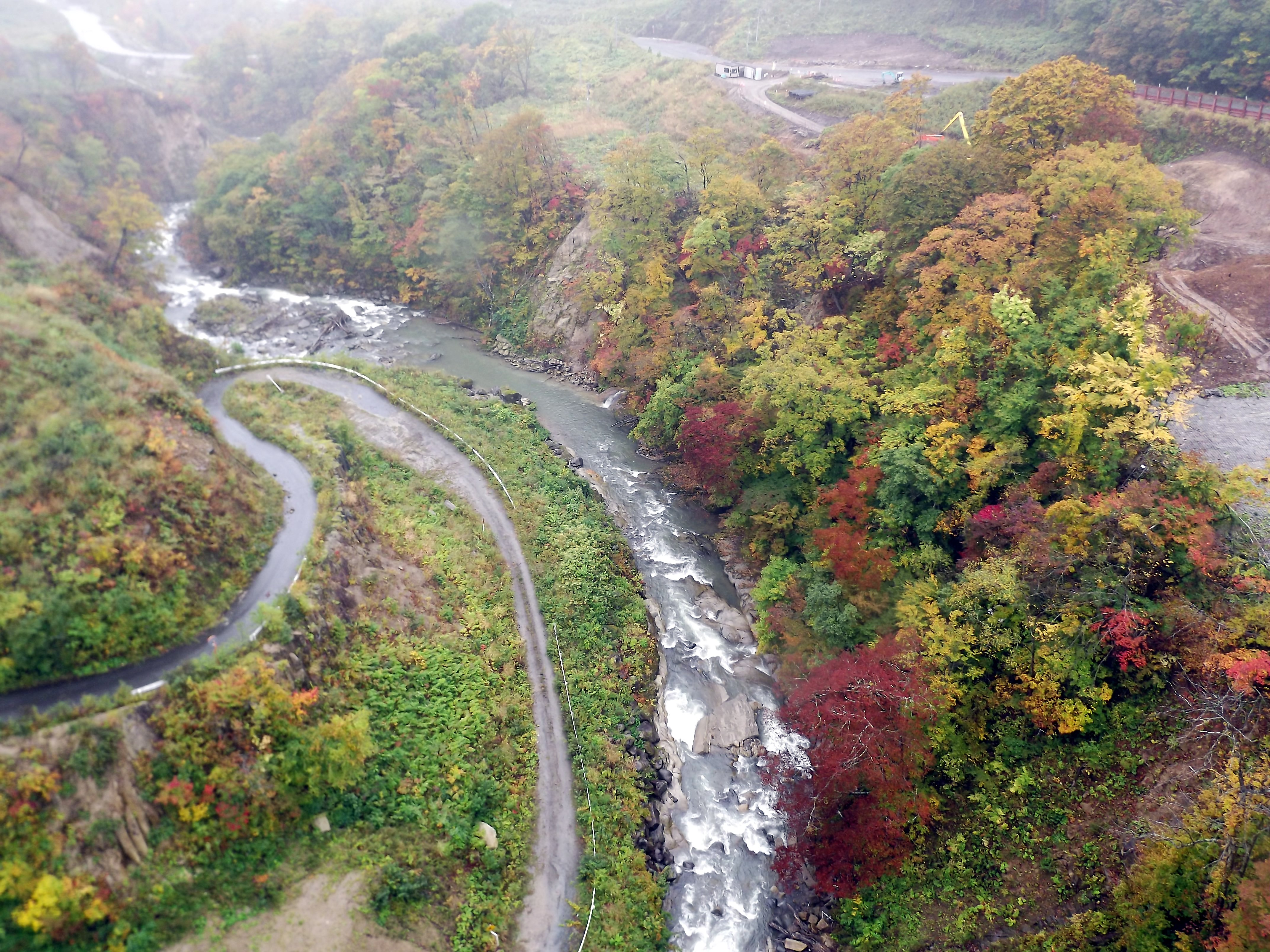 尿前川（しとまえがわ。岩手県奥州市胆沢区。北上川水系胆沢川支流）